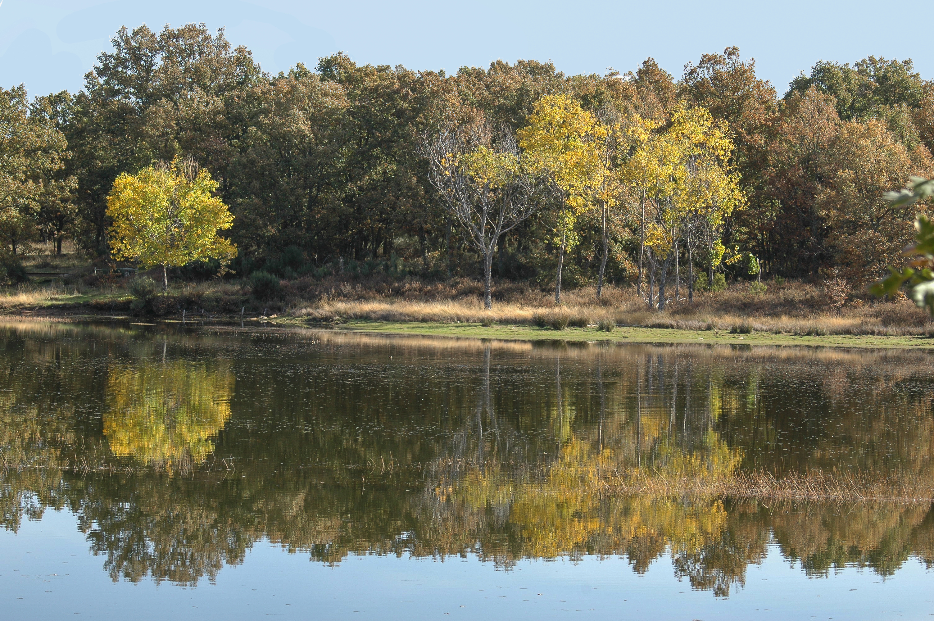 Las Batuecas-Sierra de Francia This is a photography of a Site of Community Importance in Spain with the ID: ES4150107. Natura2000 entry, EEA entry